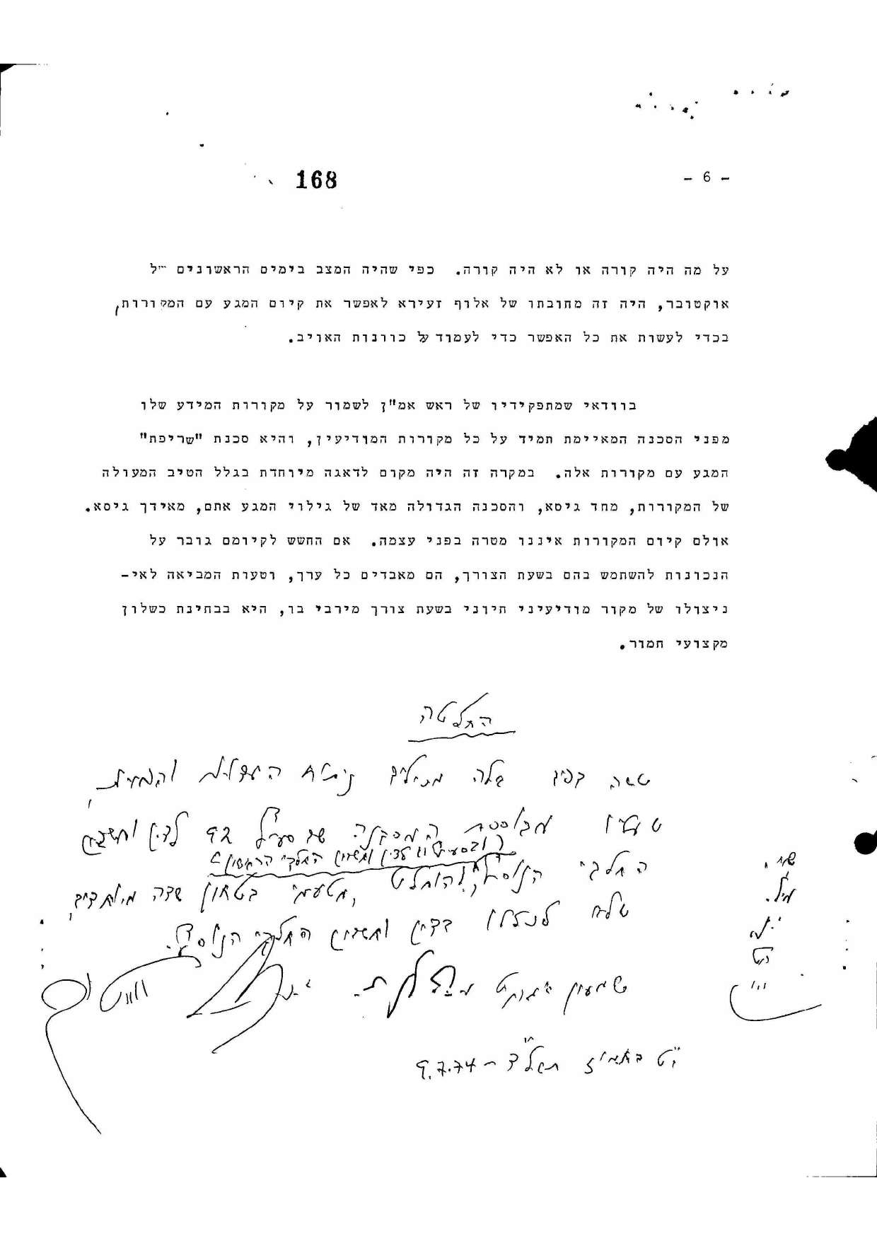 הדוח הסודי של ועדת אגרנט על האמצעים המיוחדים - עמוד אחרון